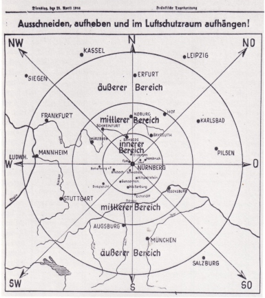 Luftlagekarte Seit 21 März 1944 wurden zu jeder vollen Stunde im Reichsrundfunk "Luftlagemeldungen" gegeben. Mit dieser Karte sollten die Bunkerinsassen die "Bomberströme" lokalisieren können.